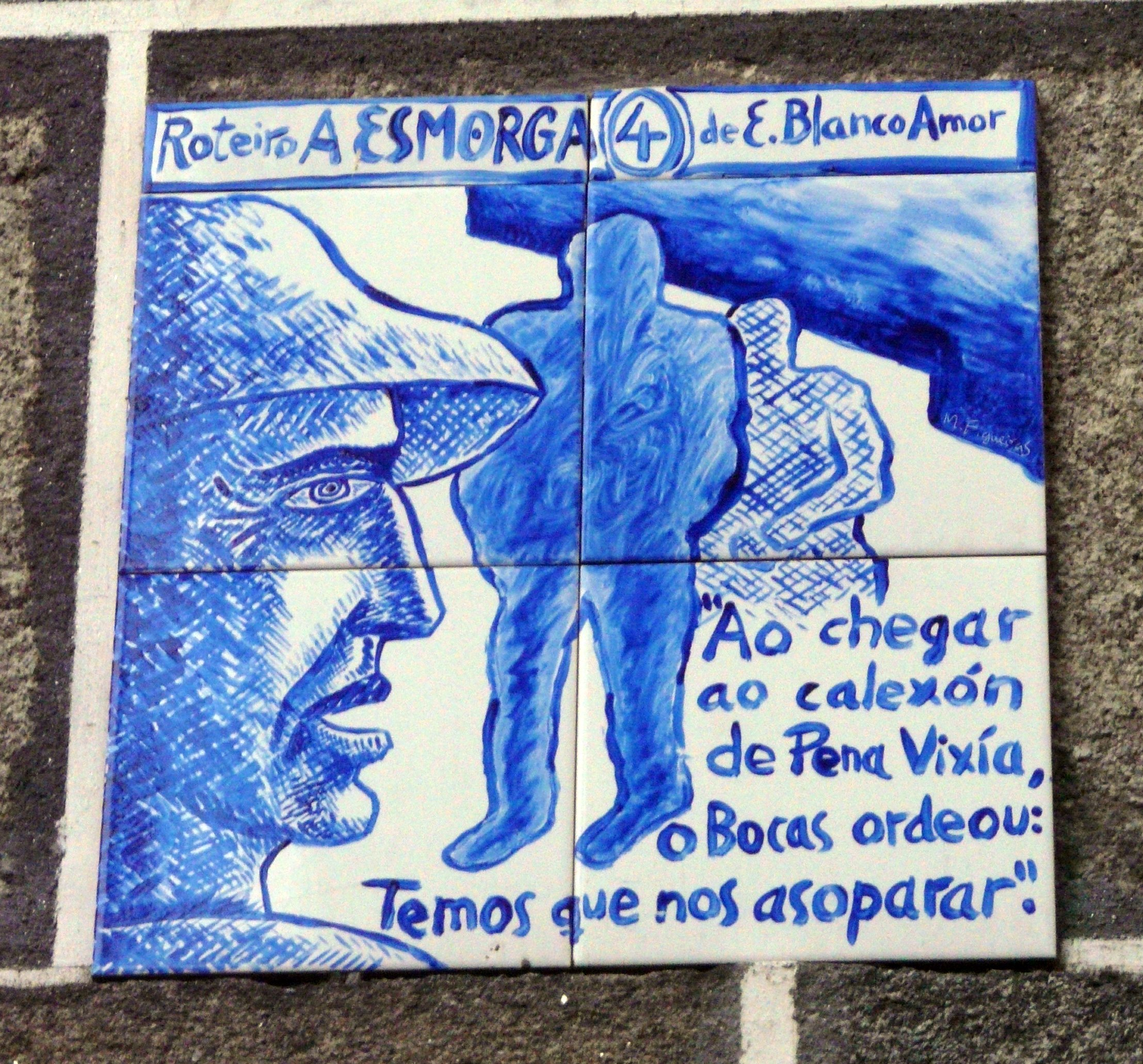 Roteiro A Esmorga, Ourense. Eduardo Blanco Amor